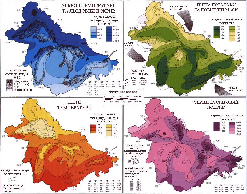 Кліматичні карти Великих Озер